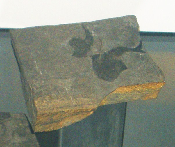 Fossil of Lanarkia, an extinct fish- Took the photo at Museon museum, Den Haag